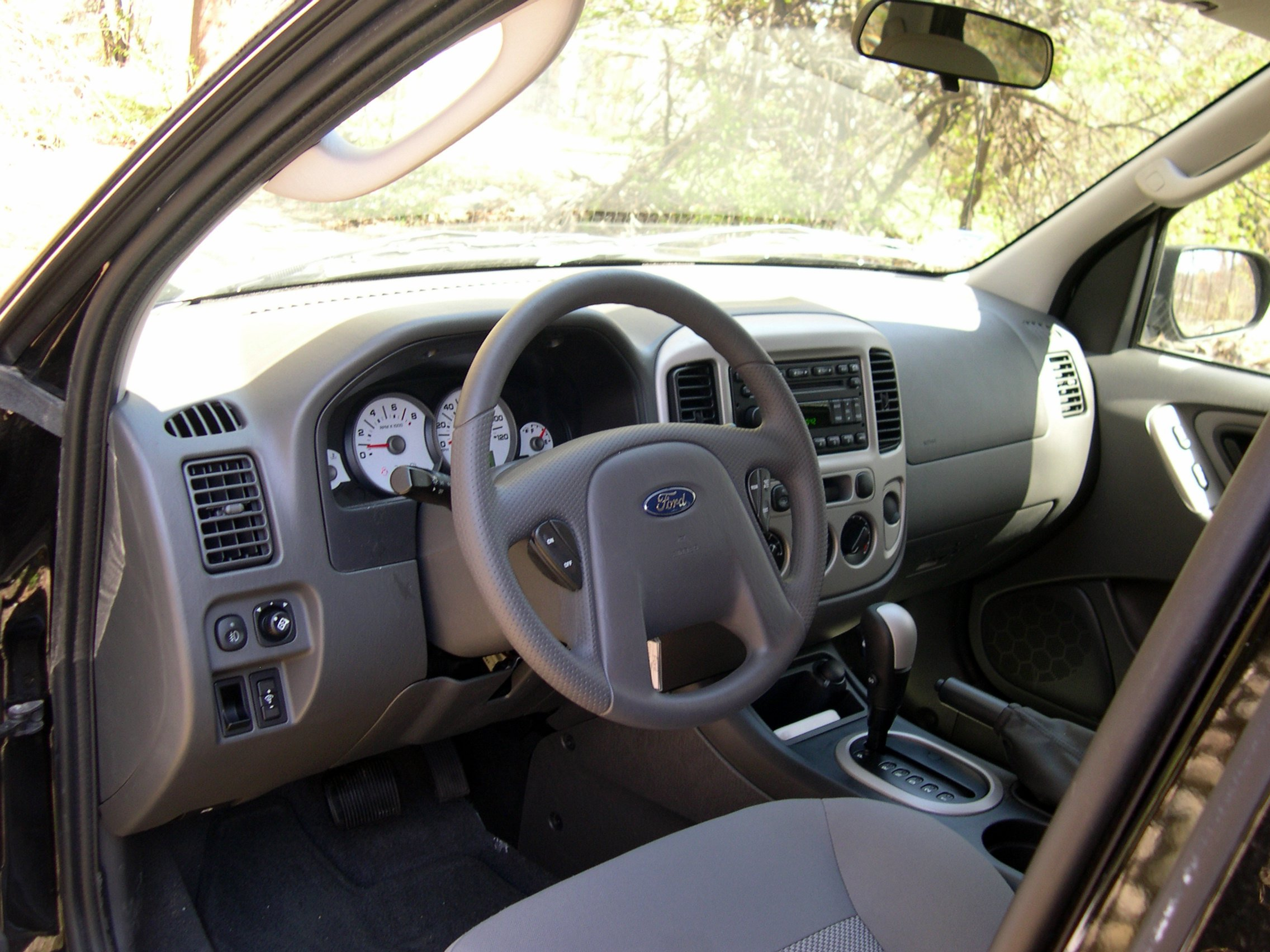 2006 Ford Escape